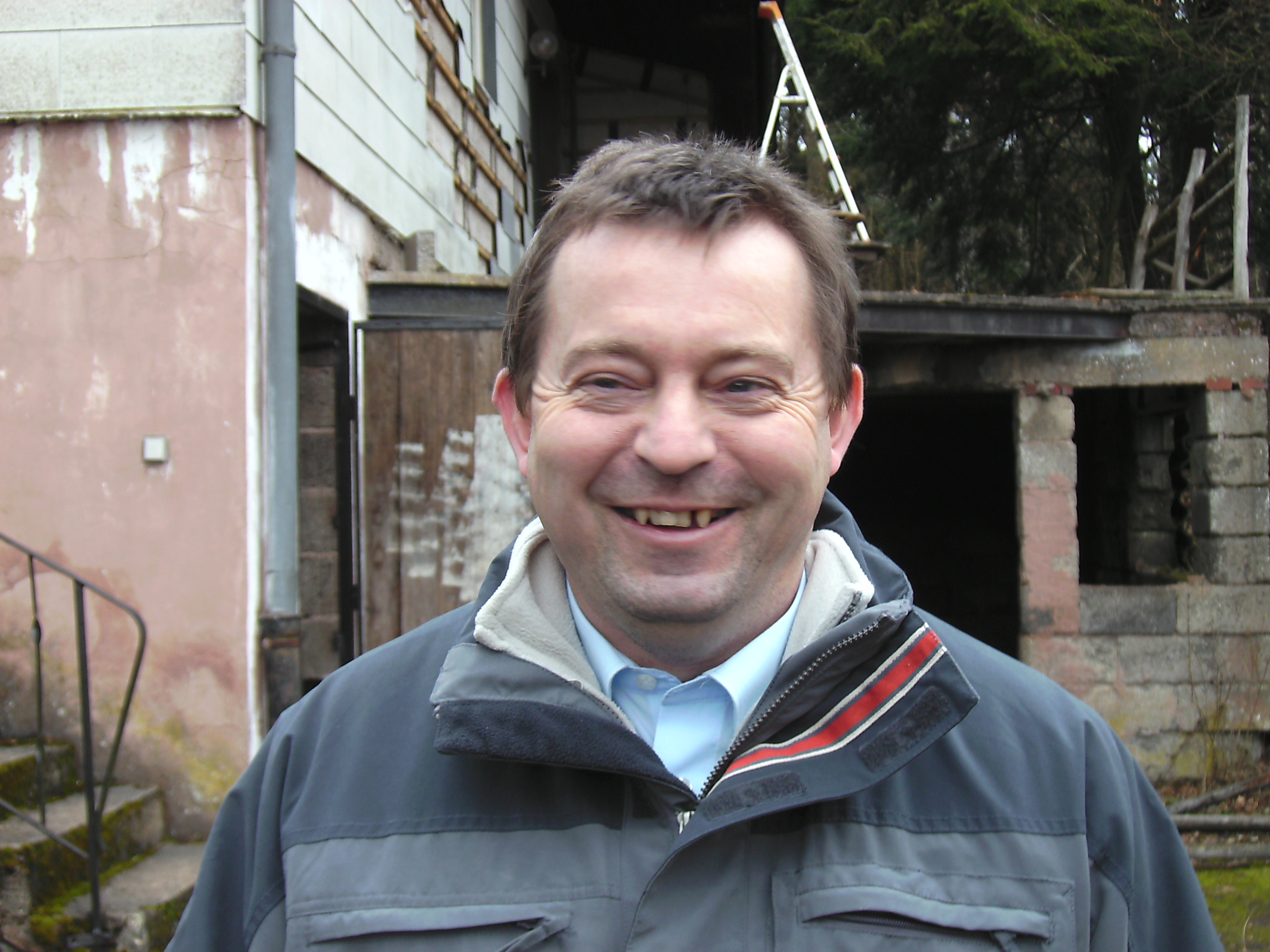 Saarländischer Umweltminister Stefan Mörsdorf